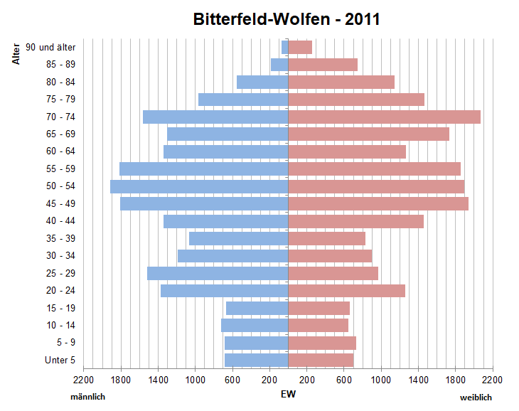 Bevölkerungspyramide der Stadt Bitterfeld-Wolfen nach Zensus 2011.